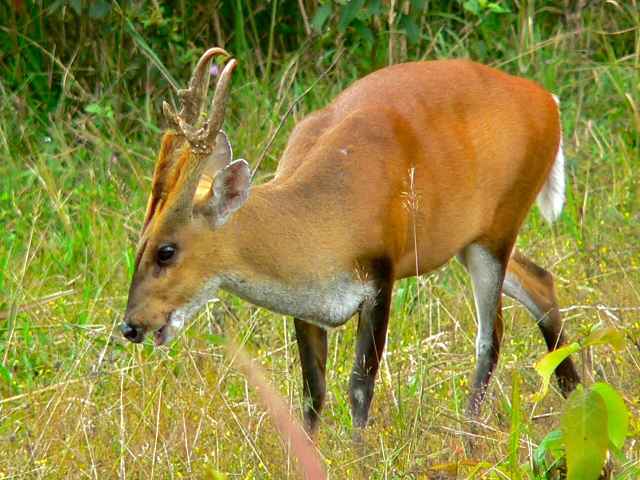 Khao Yai NP, THAILAND